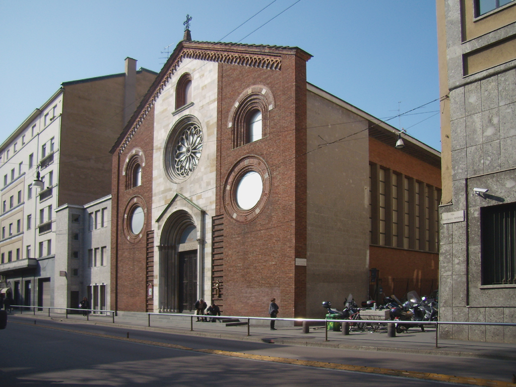 Facciata di San Giovanni in Conca in via Francesco Sforza a Milano